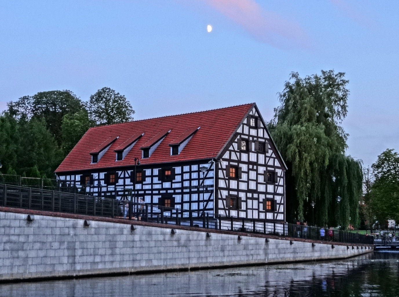 Biały Spichlerz na Wyspie Młyńskiej w Bydgoszczy, zbud. ok. 1790 r. na gotyckich piwnicach z XV-XVI w.